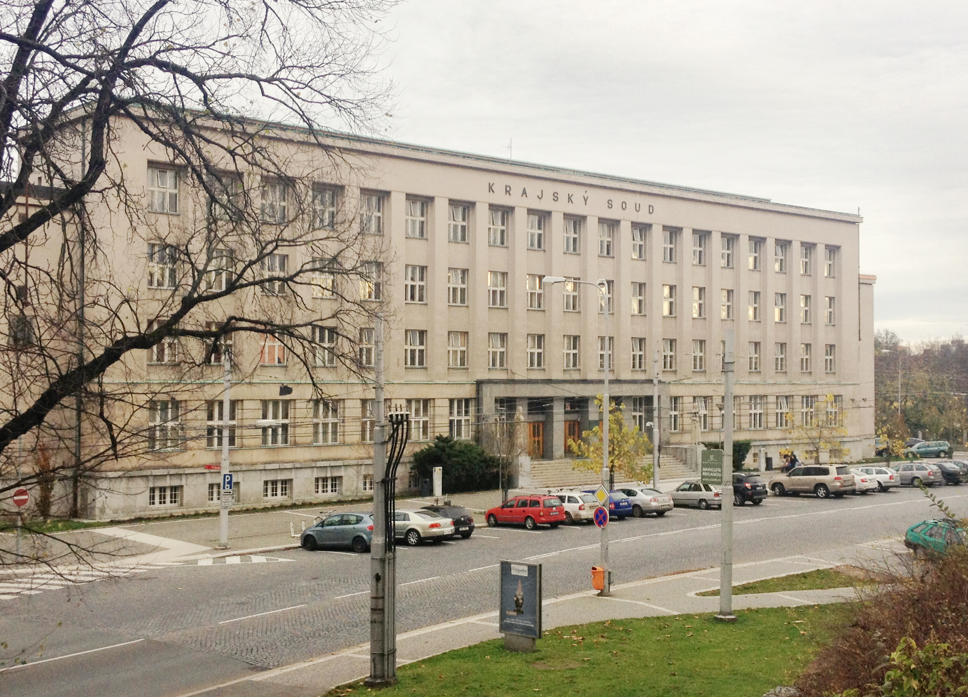 Budova Krajského soudu v Hradci Králové, Československé armády 218, Hradec Králové